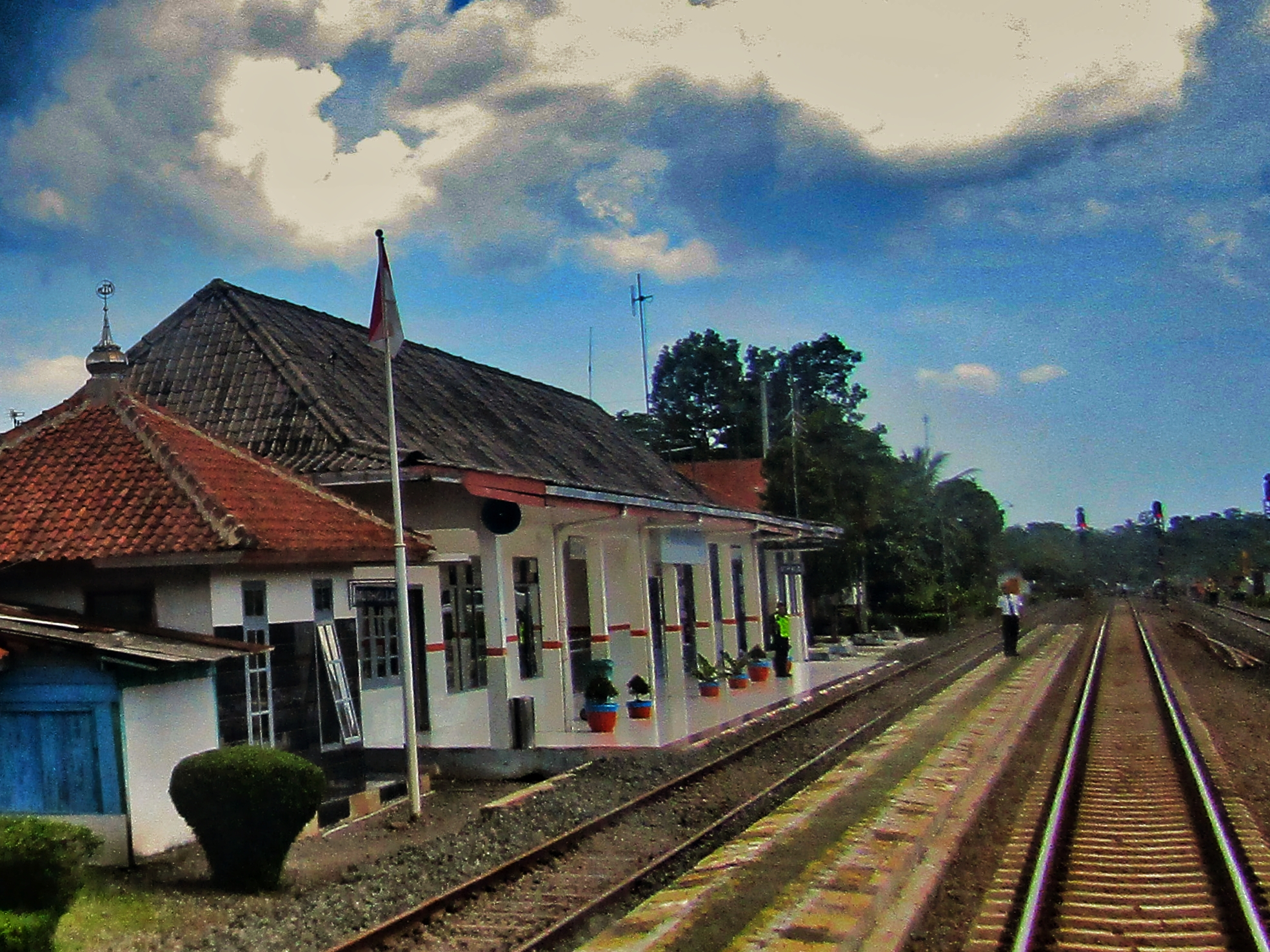 Bangunan utama Stasiun Kawunganten, 2020